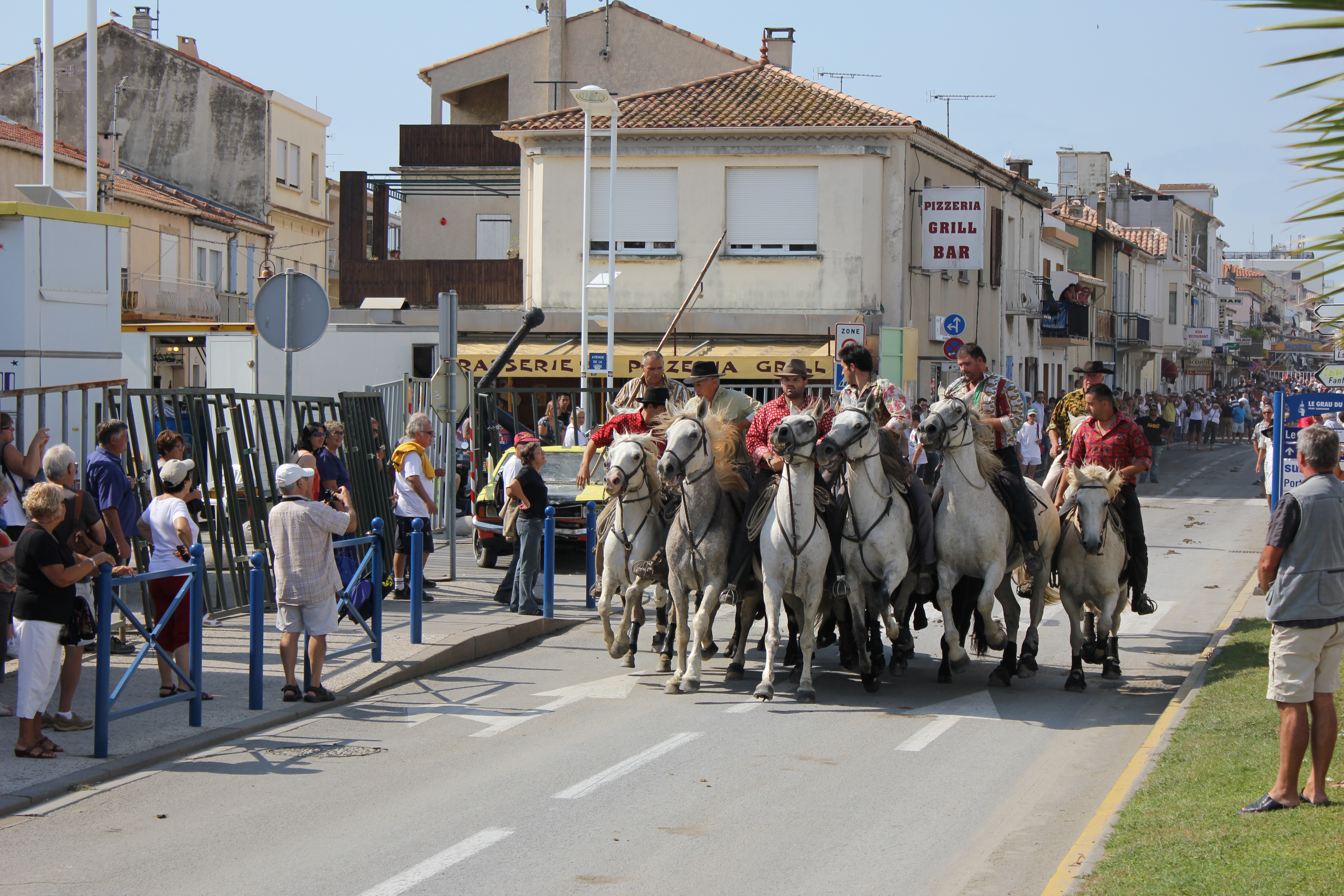 Het brengen van de stieren naar de arena voor de Courses Camarguese